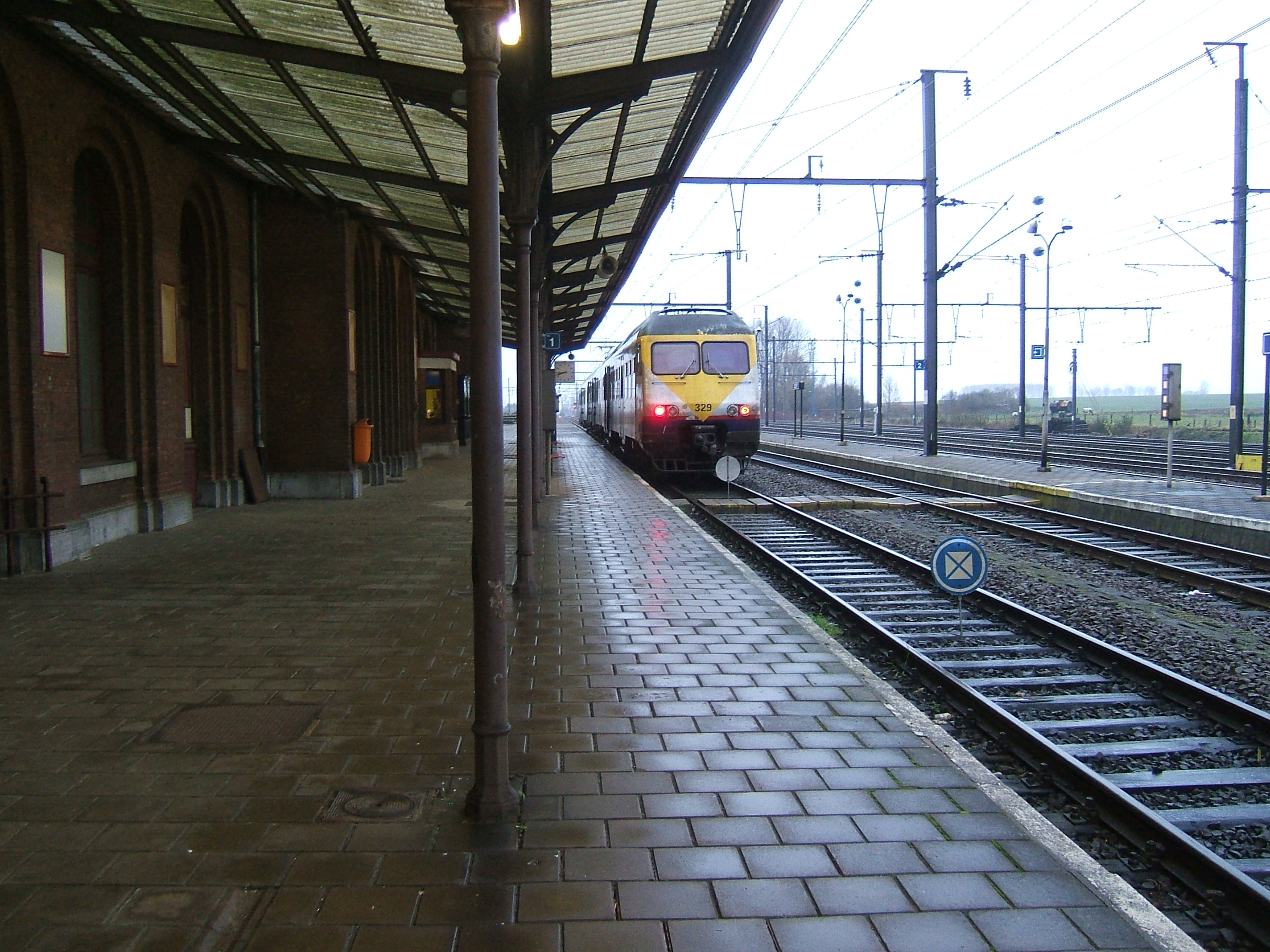 Intérieur de la gare de Quévy en Belgique. Marquise et quais avec l'arrivée d'un train belge en 2008.